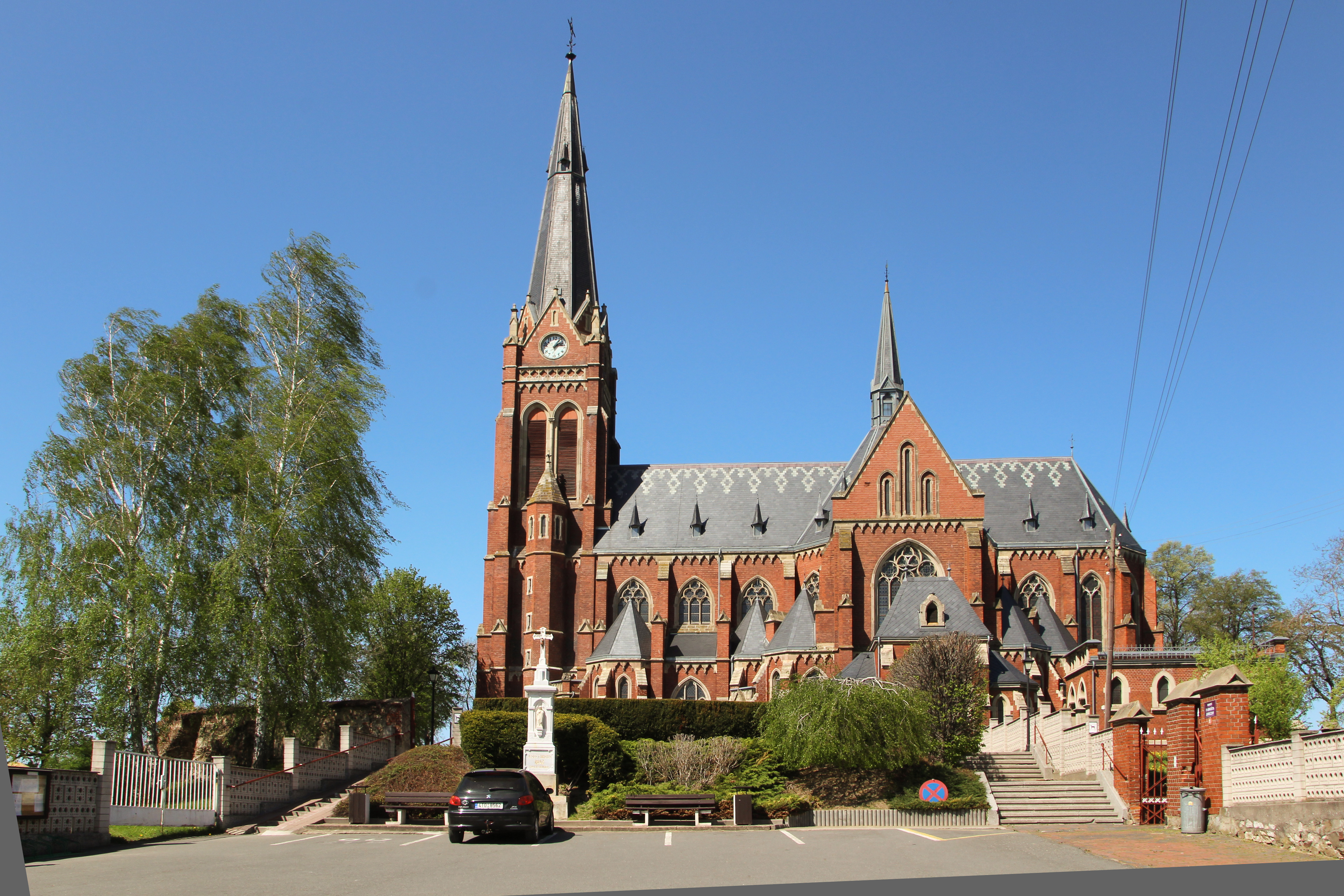 Sudice (Sudzice) - wieś gminna w Czechach, w powiecie opawskim.